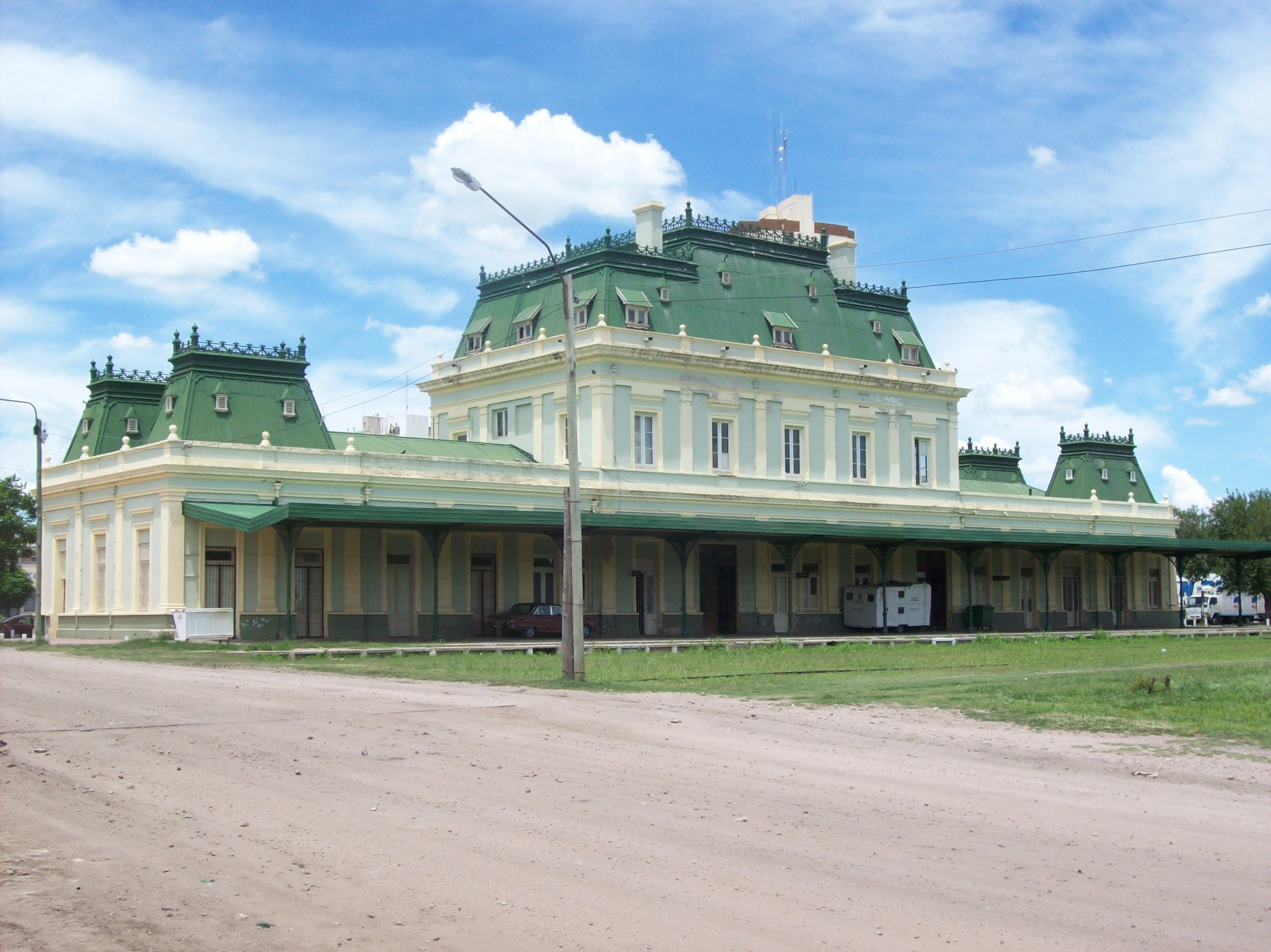 Andén de la ex-estación de trenes de San Luis, en la capital de la provincia del mismo nombre, Argentina.